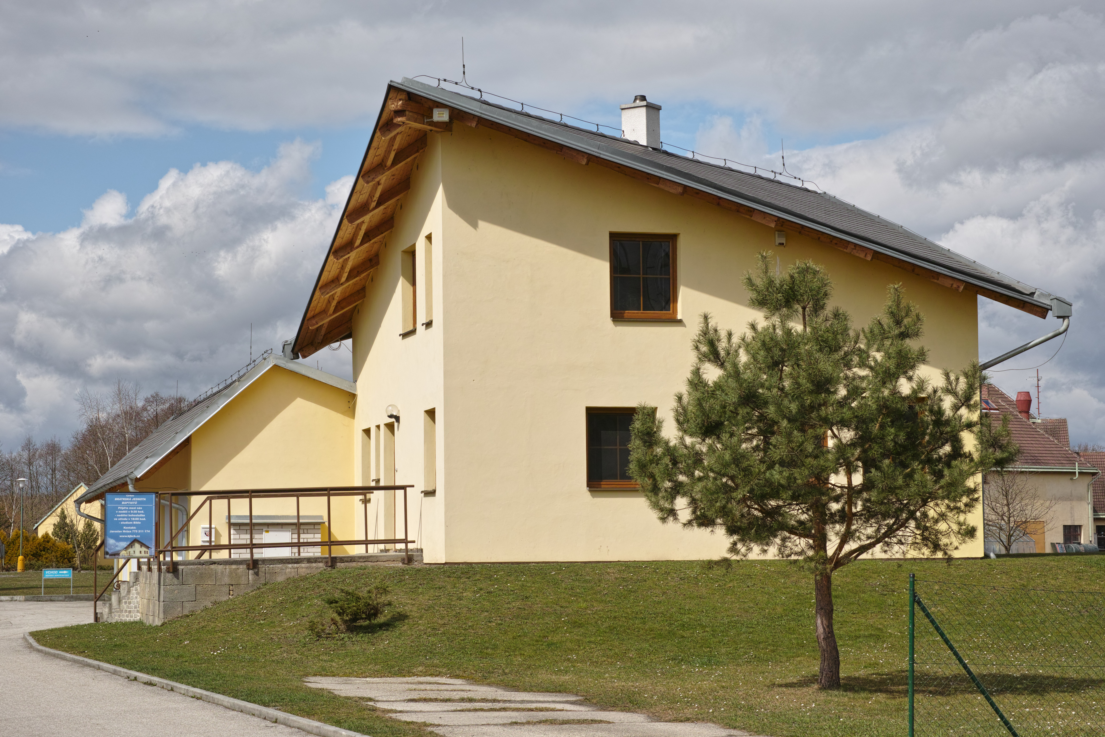 Modlitebna Bratrské jednoty baptistů (České Budějovice, U Hvízdala 9a), duben 2013